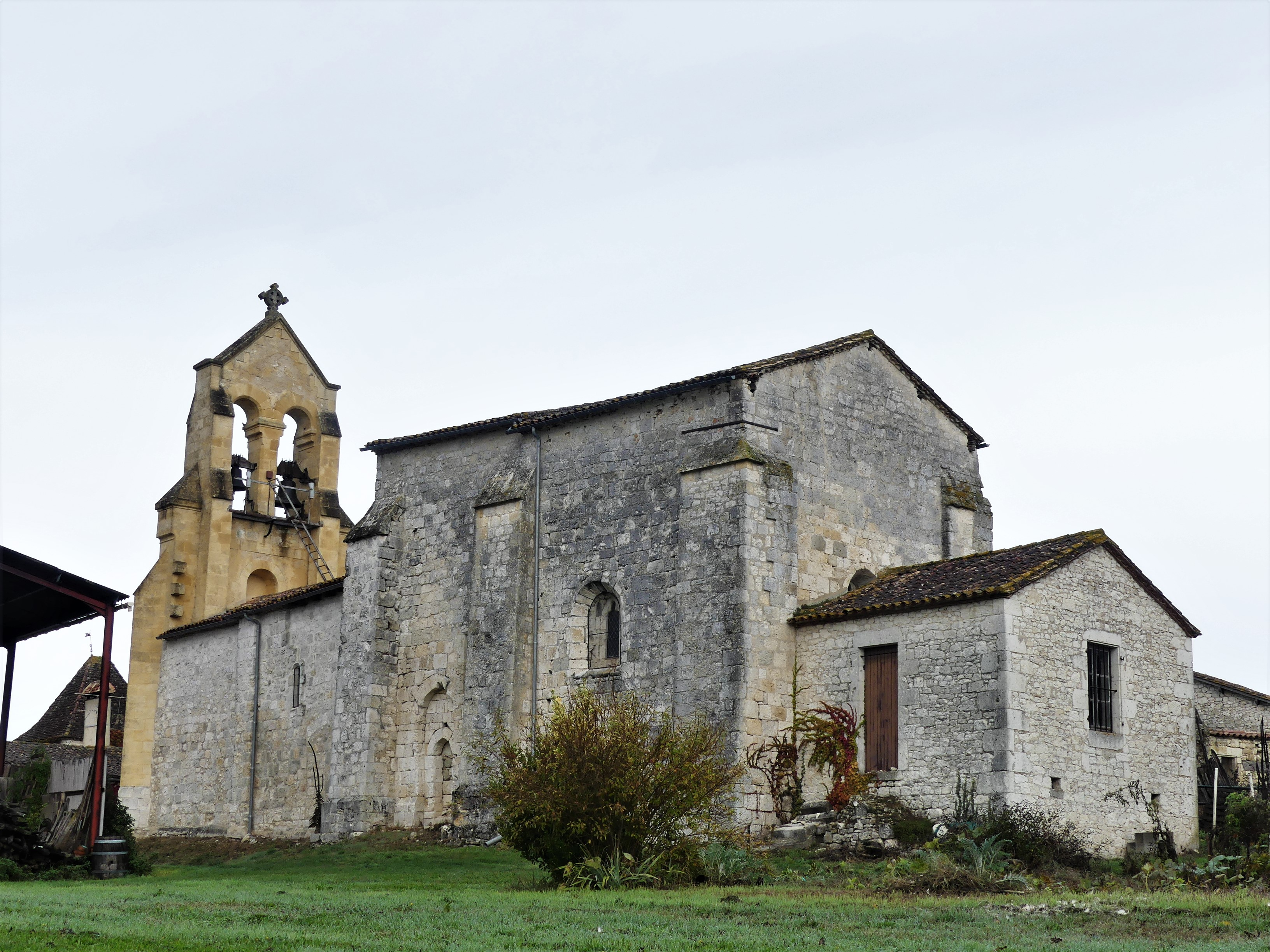 L'église de Saint-Julien-d'Eymet, Dordogne, France.